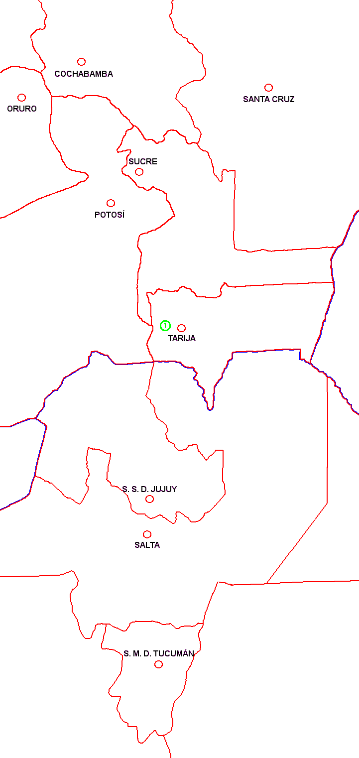 Rebutia zecheri - range map